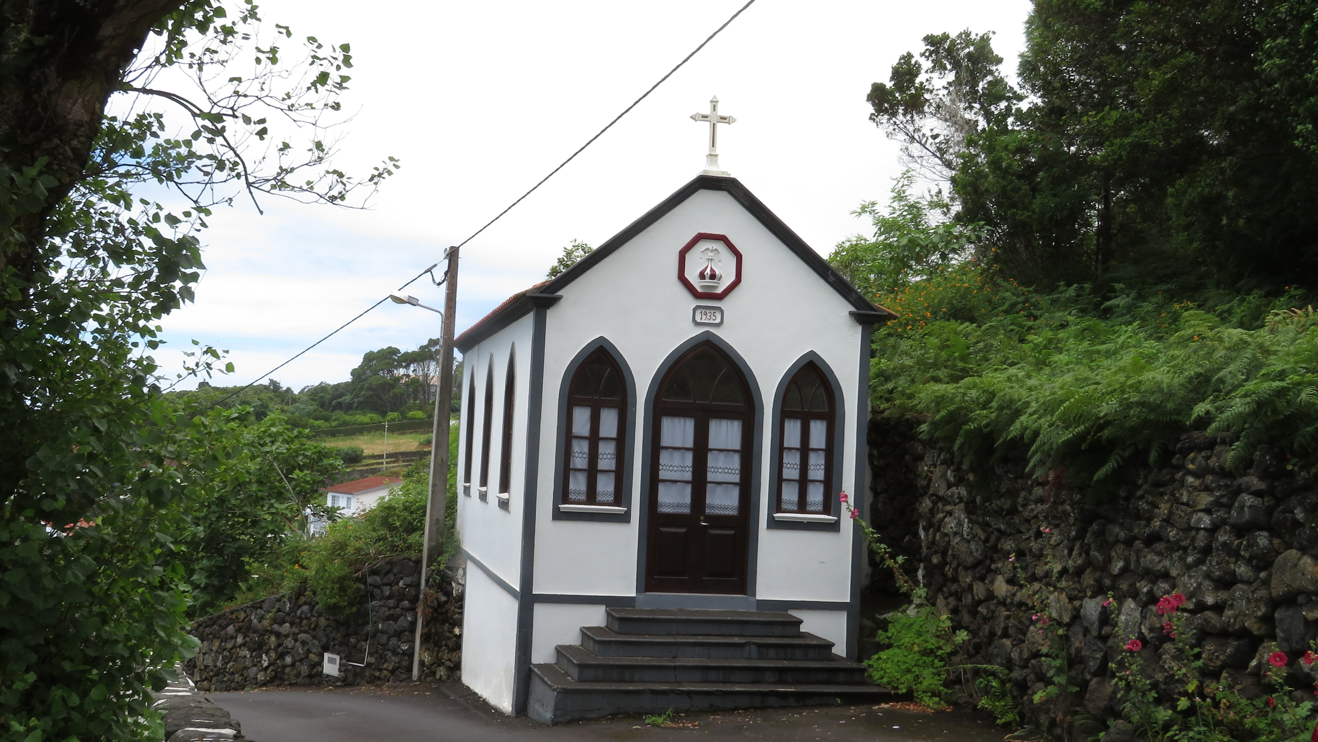 Heilig-Geist-Kapelle in Manadas, Insel Sao Jorge, Azoren, Portugal